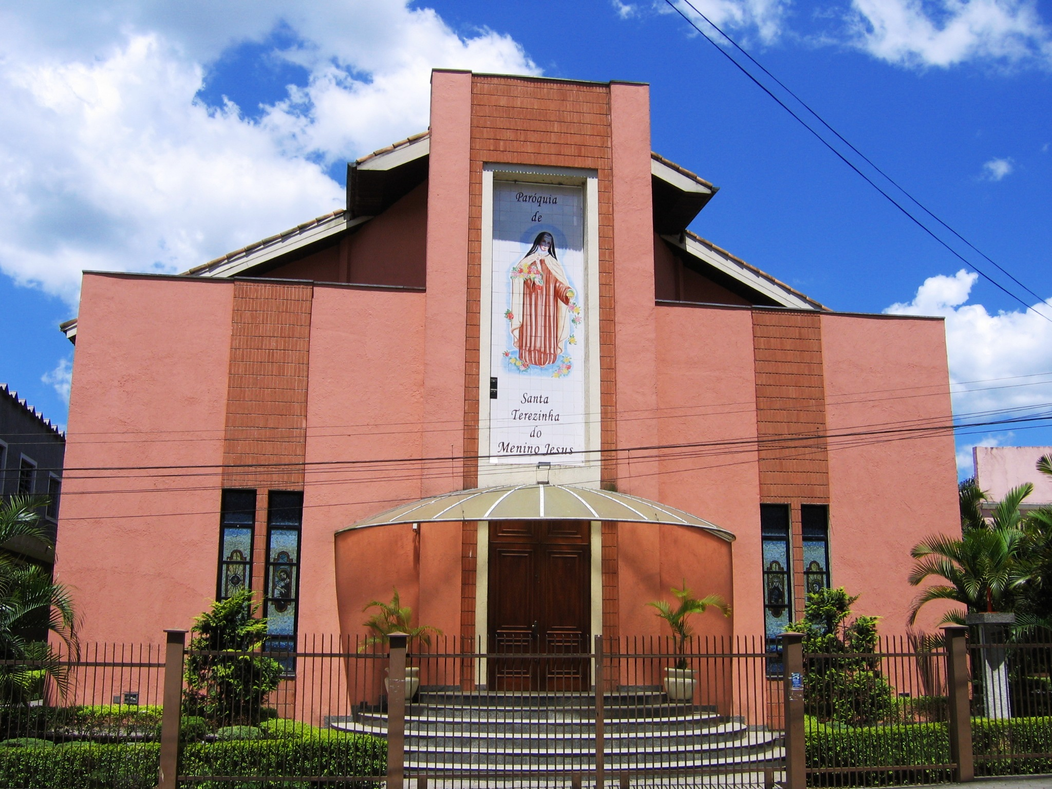 Igreja matriz de Embu-Guaçu